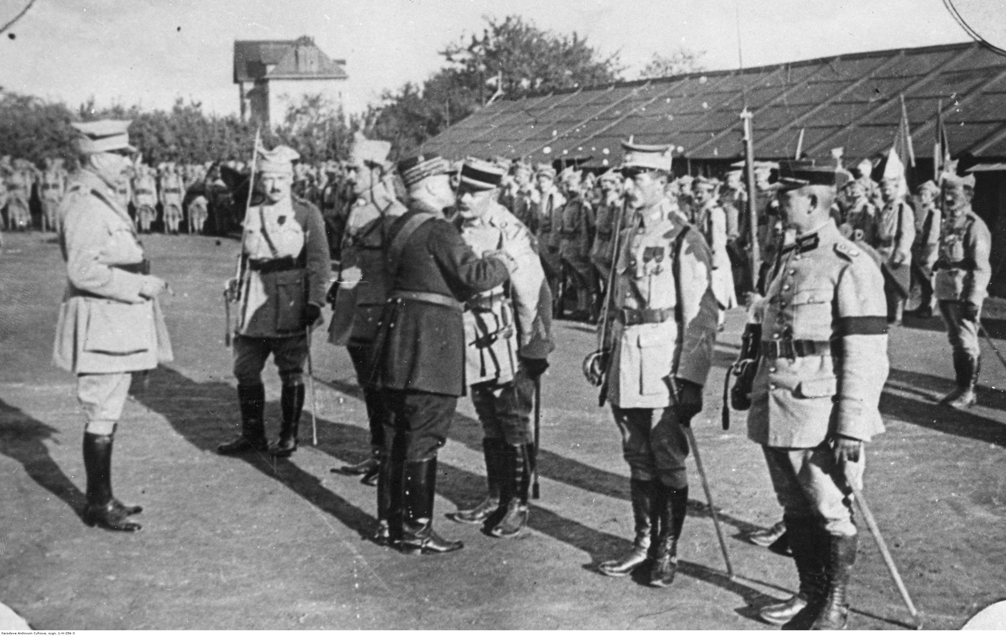 Armia Polska we Francji - ośrodek wyszkolenia w Sille-le Guillaume. Generał Louis Archinard dekoruje polskich oficerów. Koncern Ilustrowany Kurier Codzienny - Archiwum Ilustracji. Sygnatura: 1-H-256-3